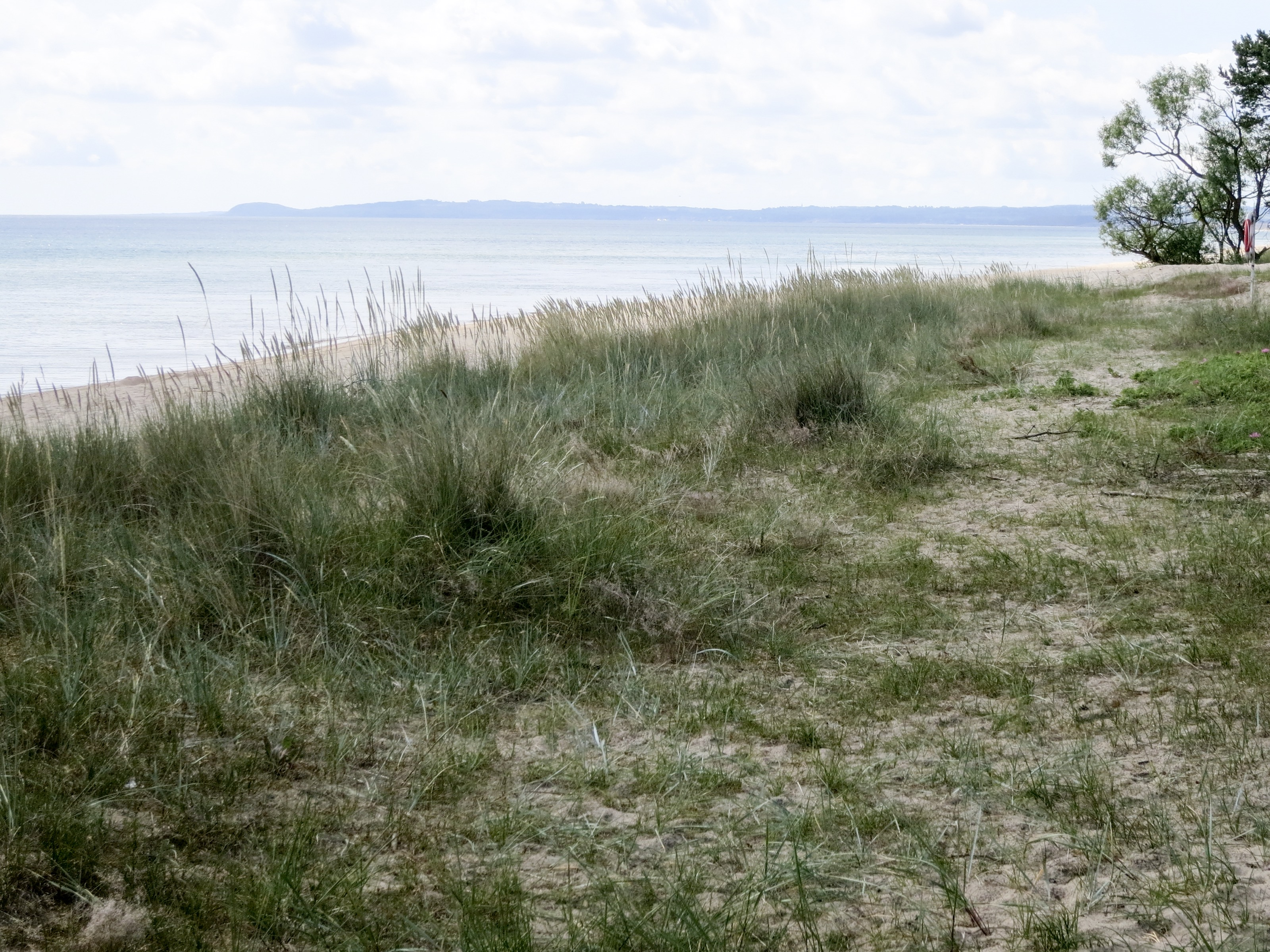 Friseboda naturreservat, stranden